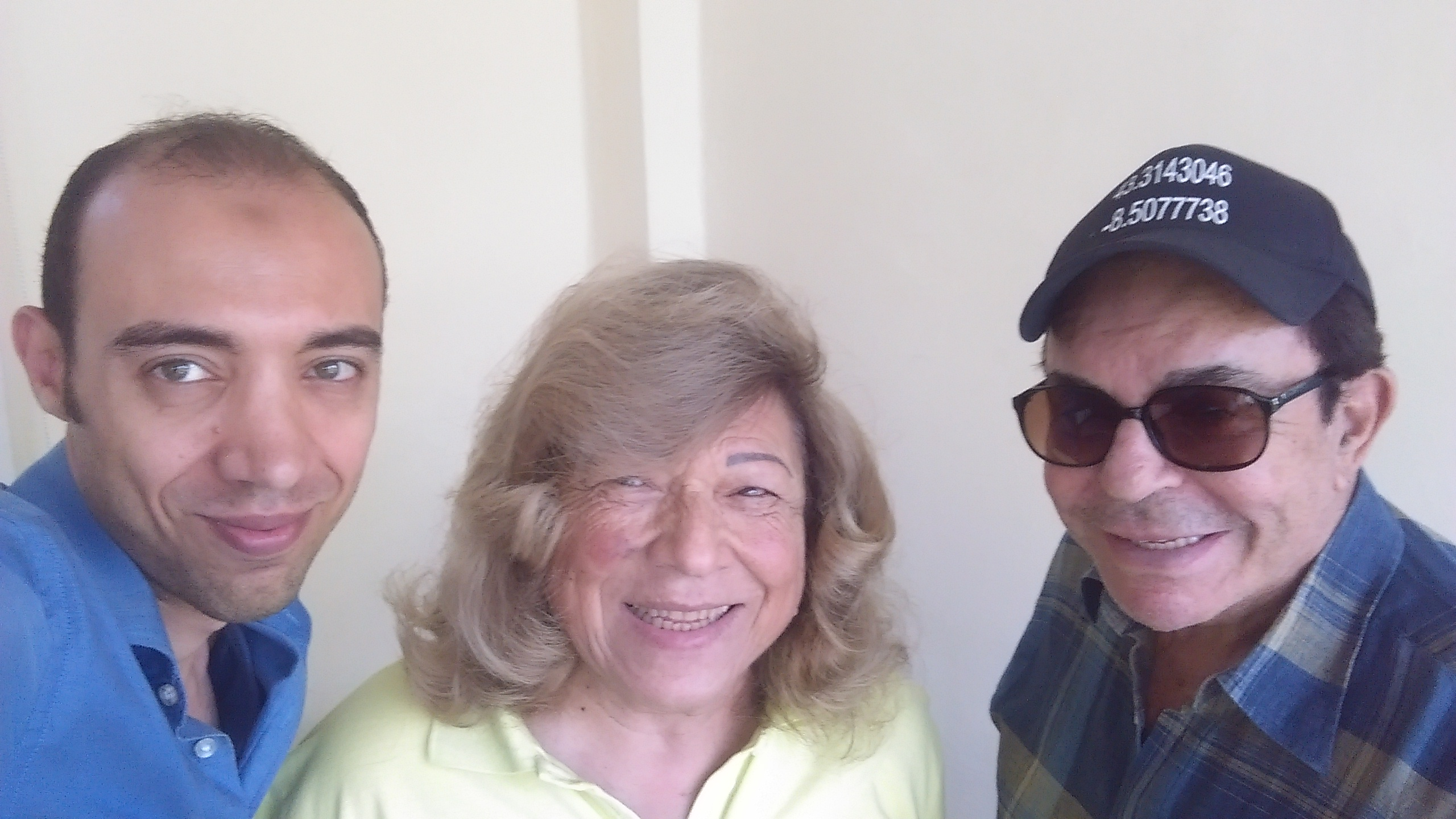 الفنانة كوثر شفيق زوجة المخرج عز الدين ذو الفقار من كواليس برنامج ذكرياتي مع سمير صبري وسيد عبد العزيز